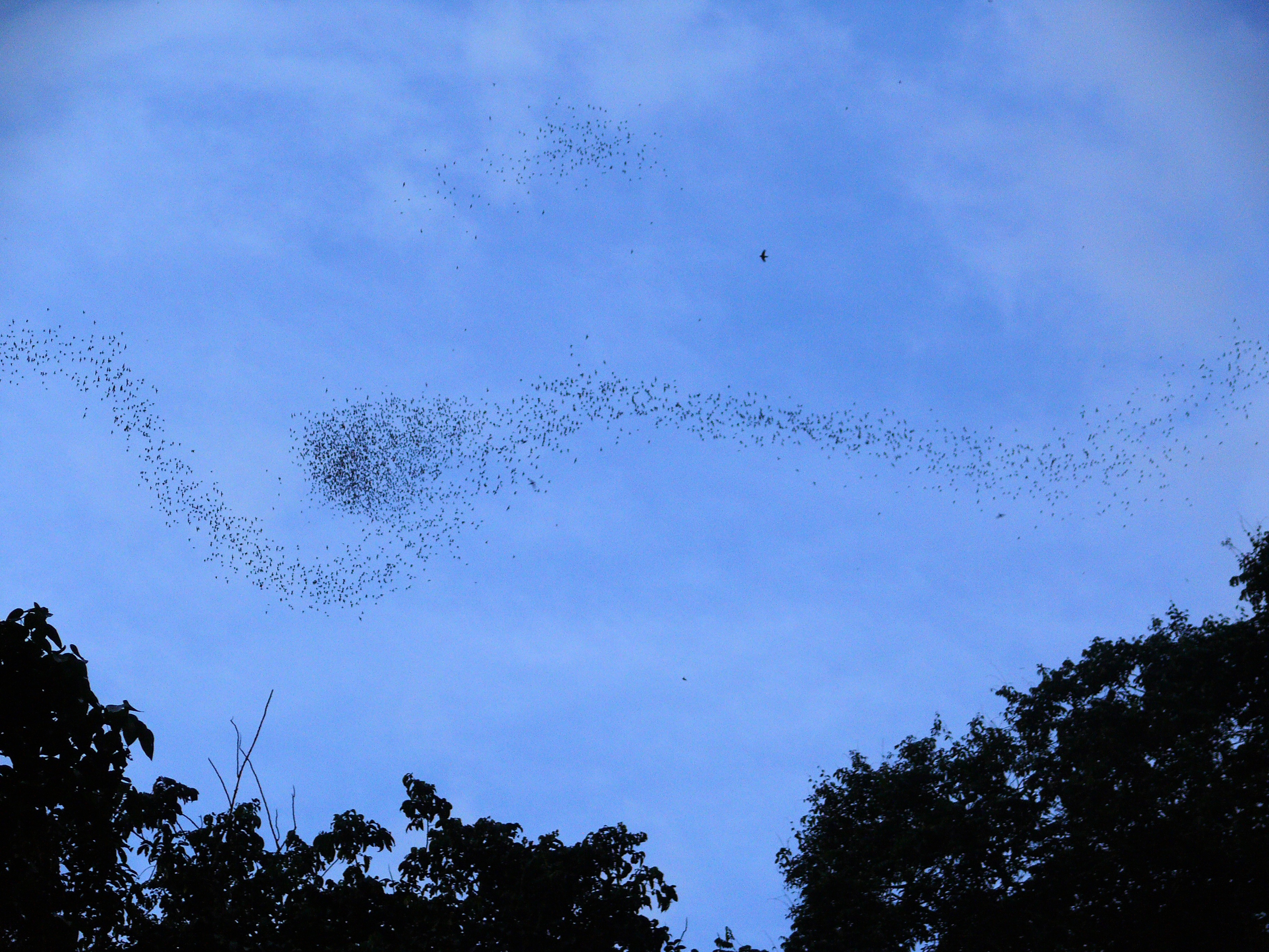 Gunung Mulu NP, Sarawak, MALAYSIA